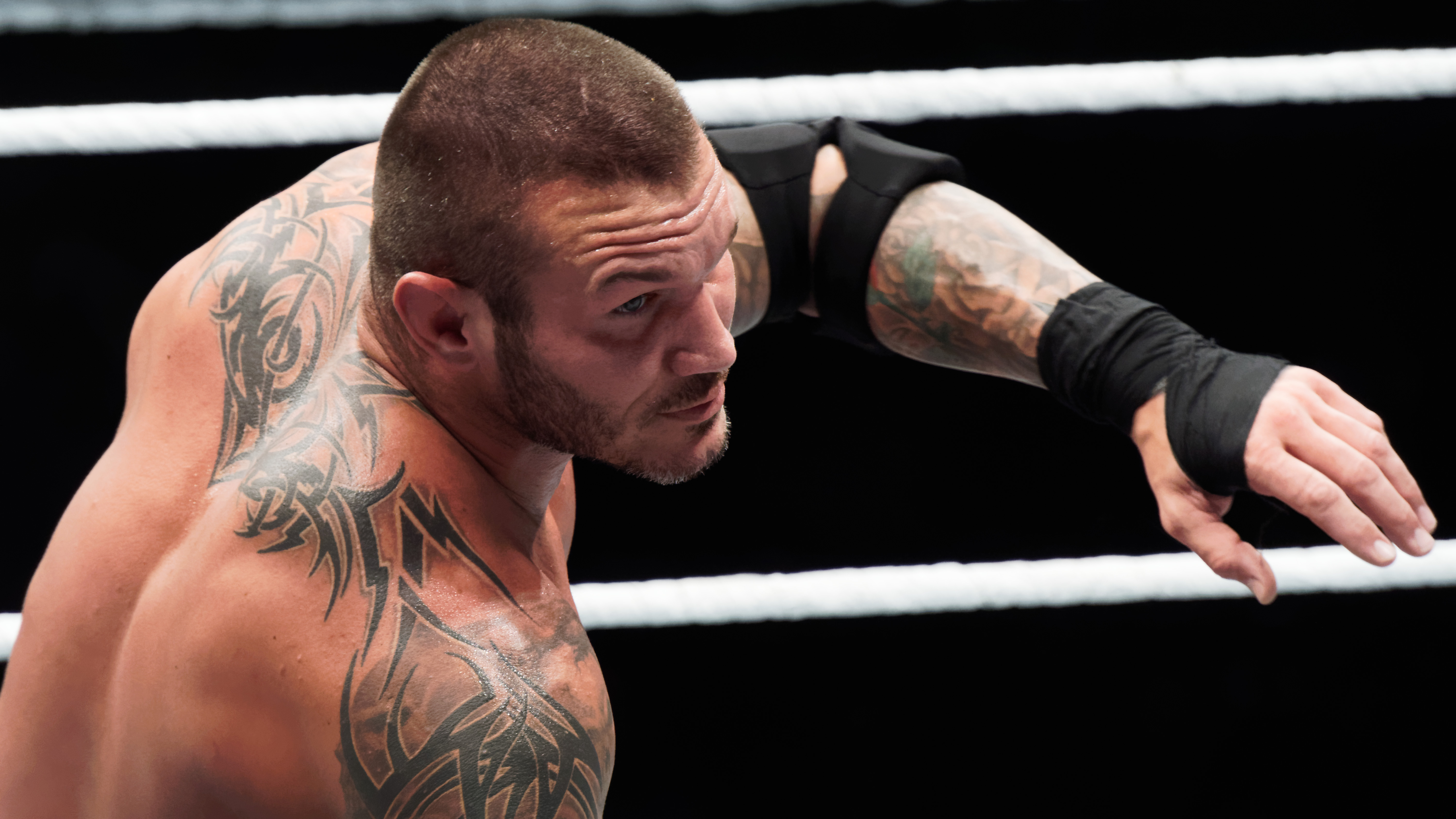 WWE Live@Lotto Arena - Antwerpen